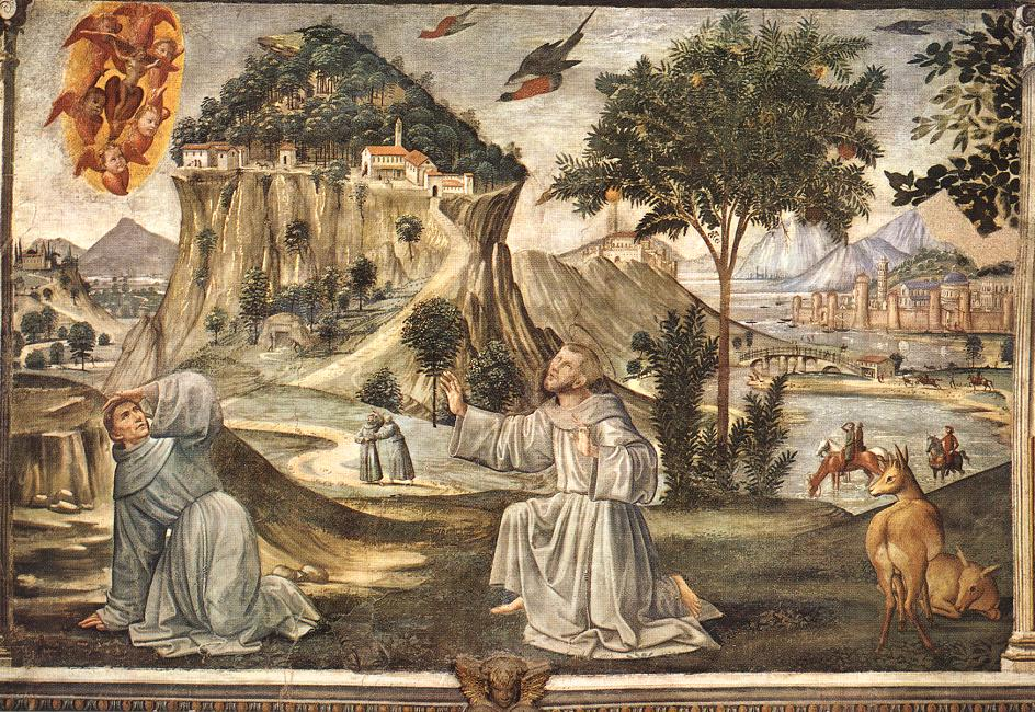 GHIRLANDAIO, Domenico Stigmata of St Francis Fresco Santa Trinità, Florence